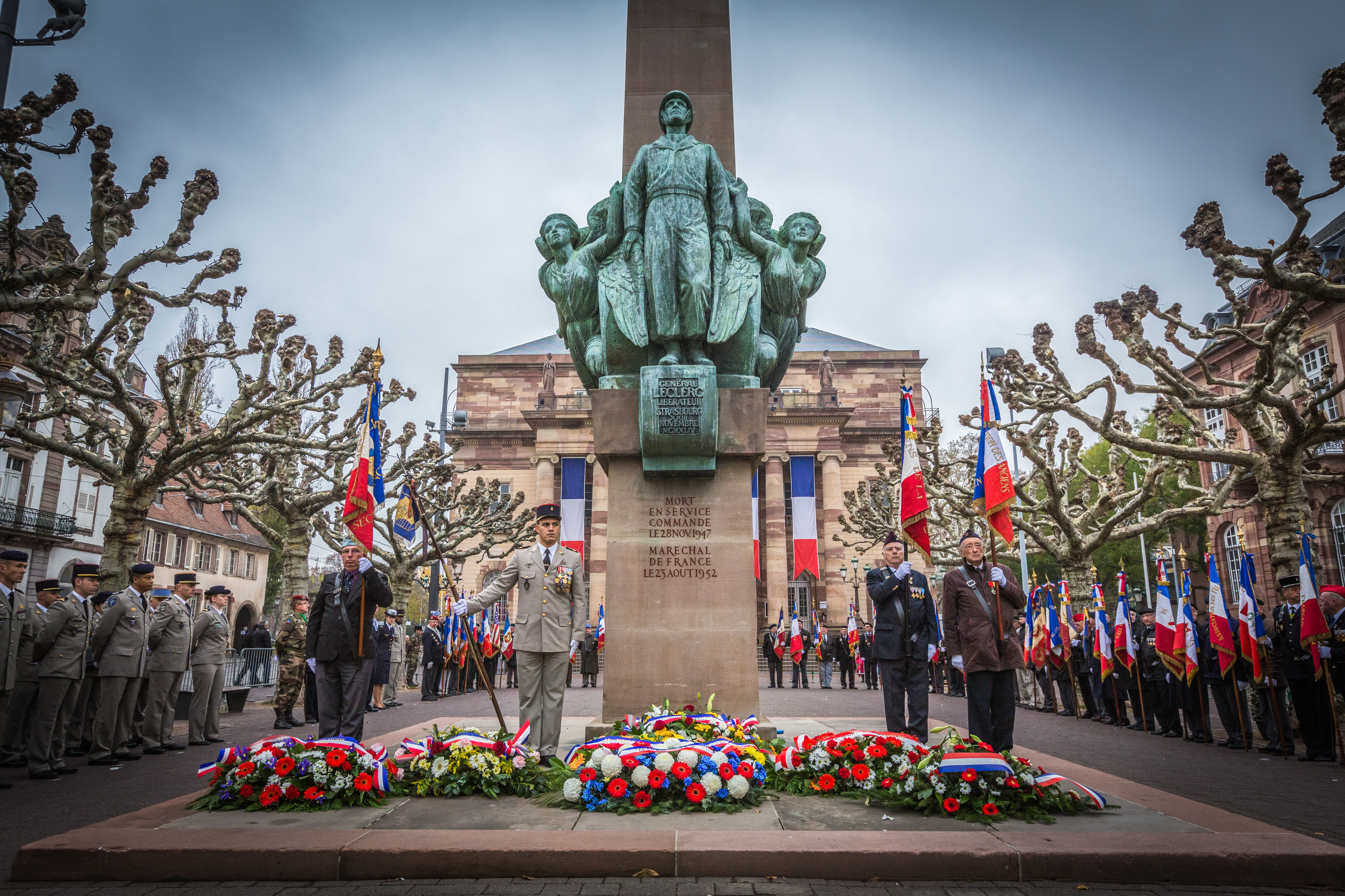 Cérémonie commémorative du 69e anniversaire de la Libération de Strasbourg